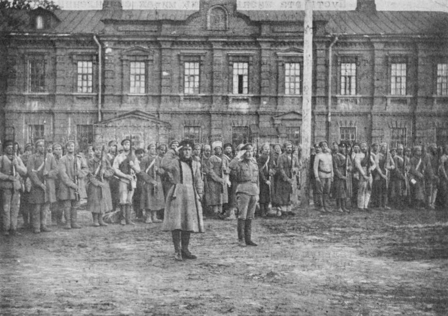 Змиевские казармы в Харькове. Поручик Г. А. Головань, командующий запасным батальоном 3-го Корниловского ударного полка, перед отправкой маршевой роты в полк. 1919 год.